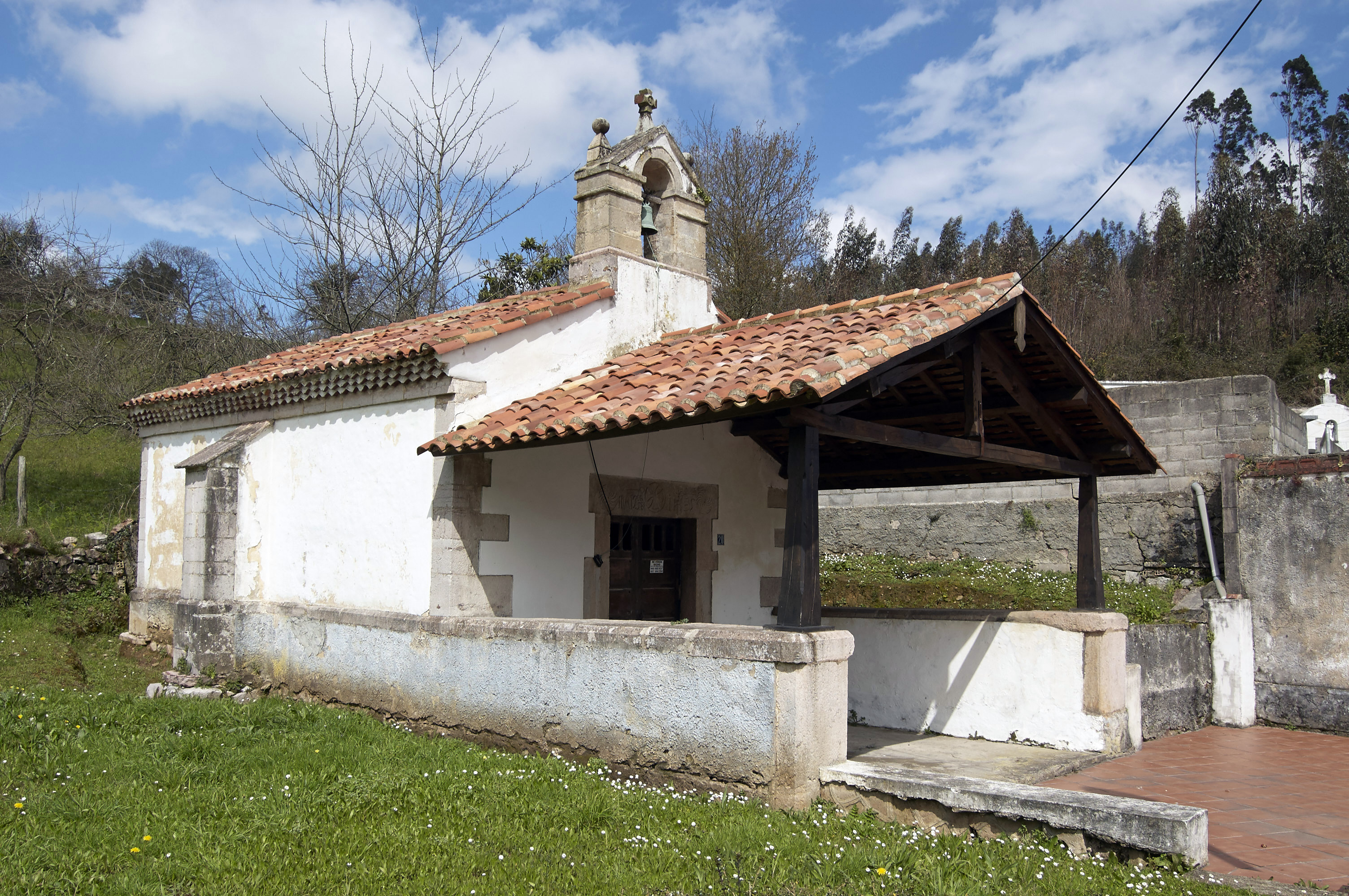 Capilla de San Pedro, Castrillón, Asturias.